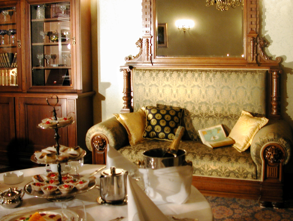 Grand Hotel Kraków